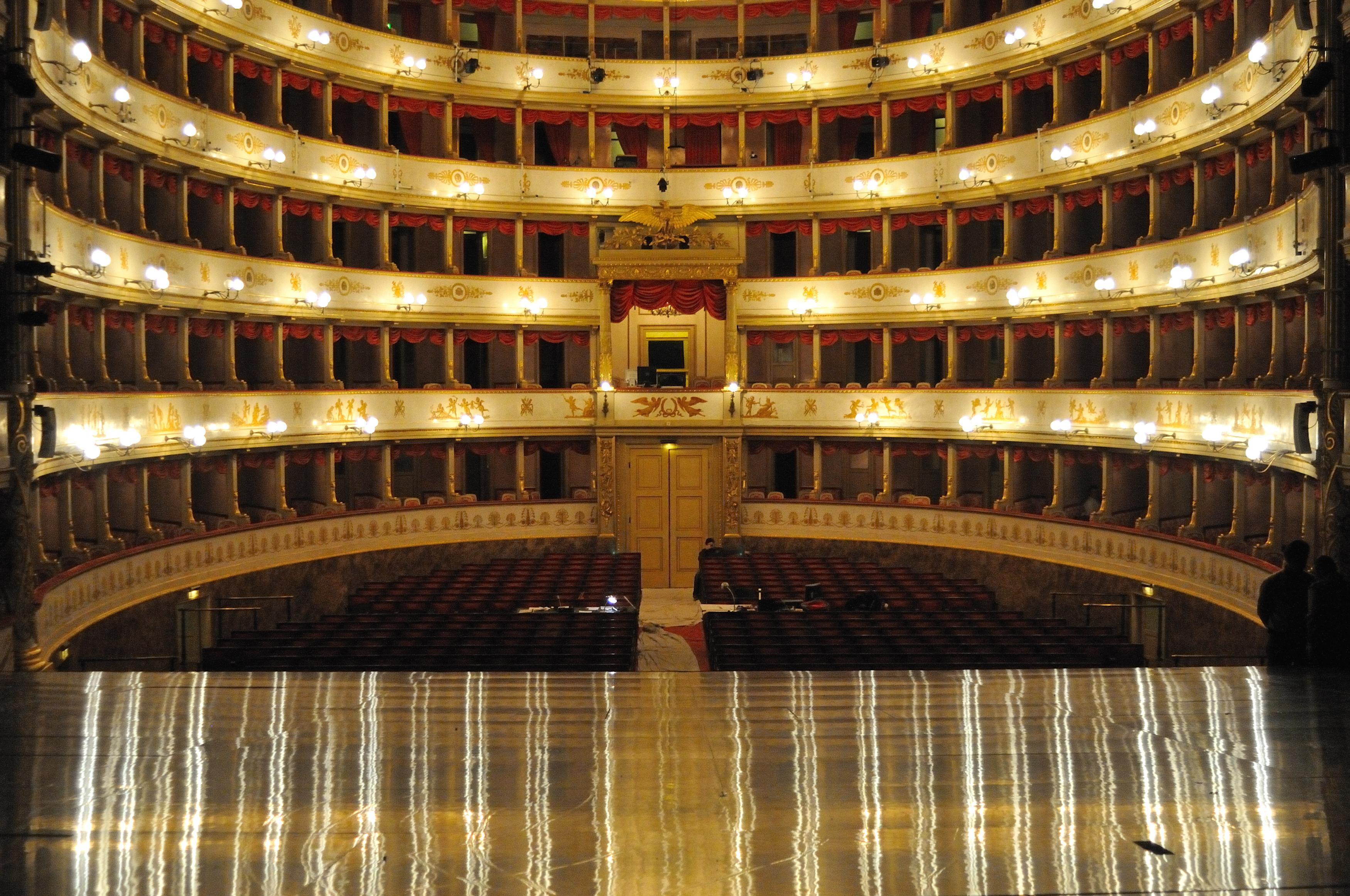 Teatro Comunale This is a photo of a monument which is part of cultural heritage of Italy.